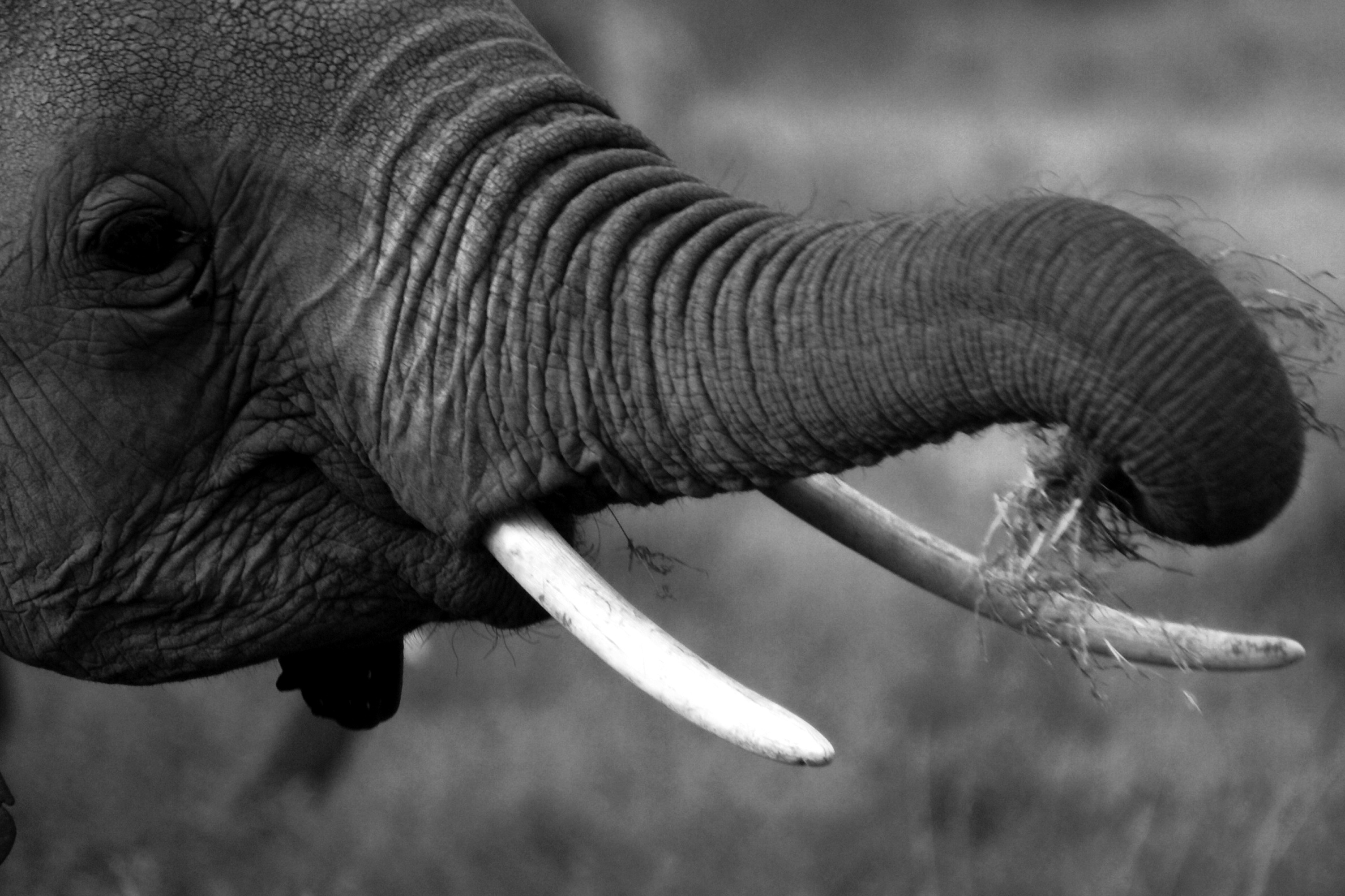 Kenya